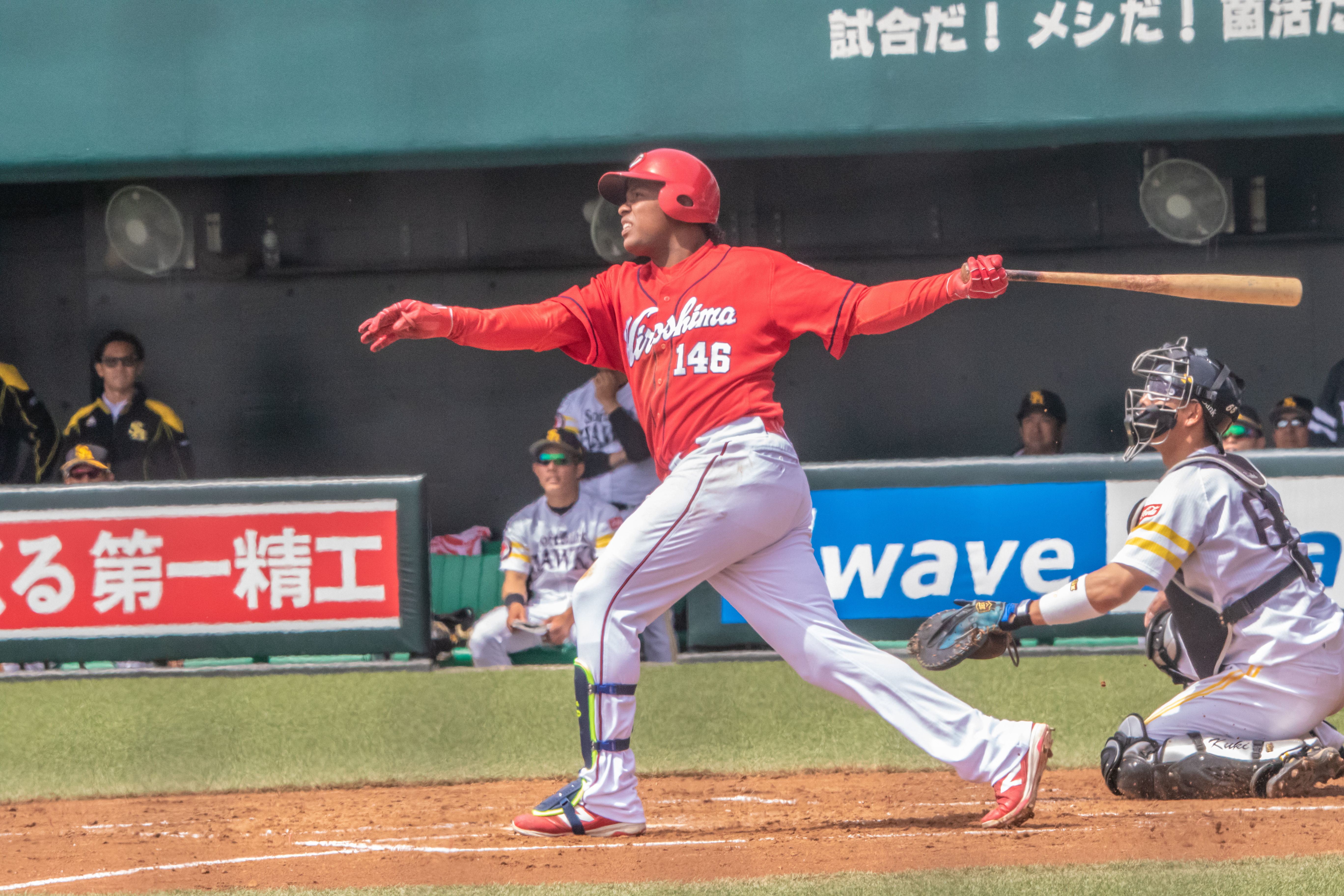 2019/4/16 タマホームスタジアム筑後